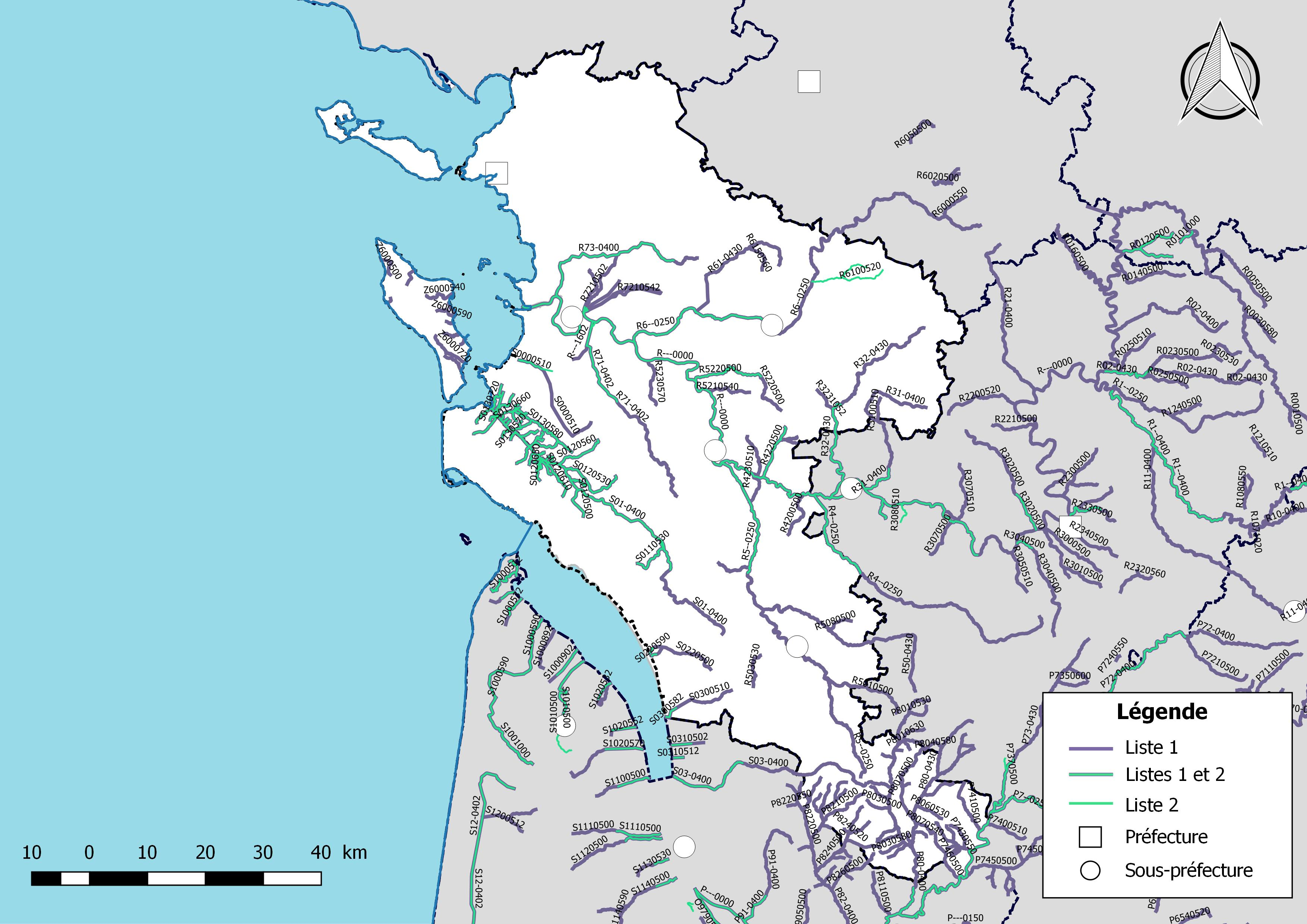 Classement des cours d'eau du département de la Charente-Maritime (France) au titre de la continuité écologique (article L214.17 I du Code de l'environnement).